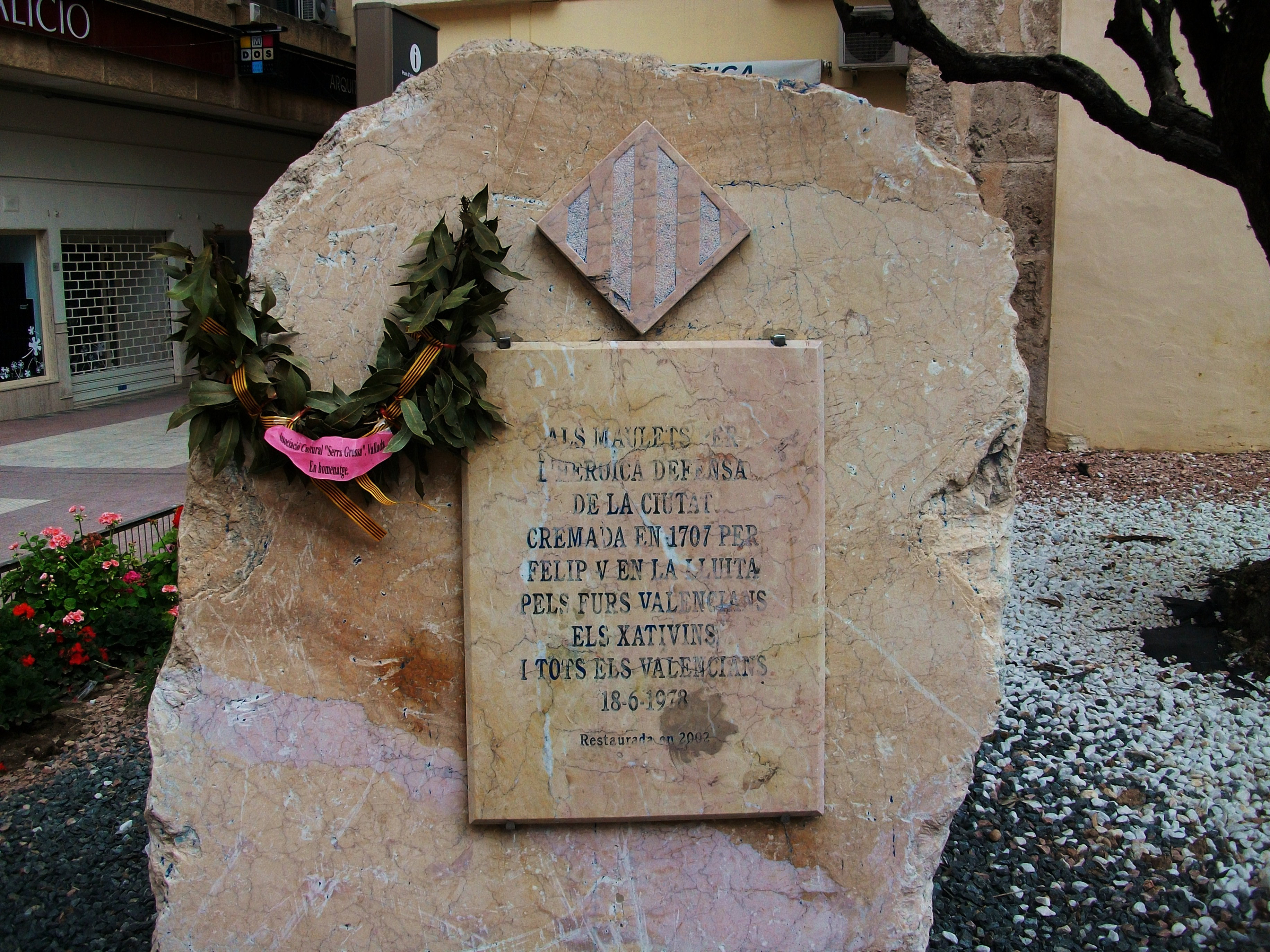 Pedra dels Maules de Xàtiva, País Valencià.